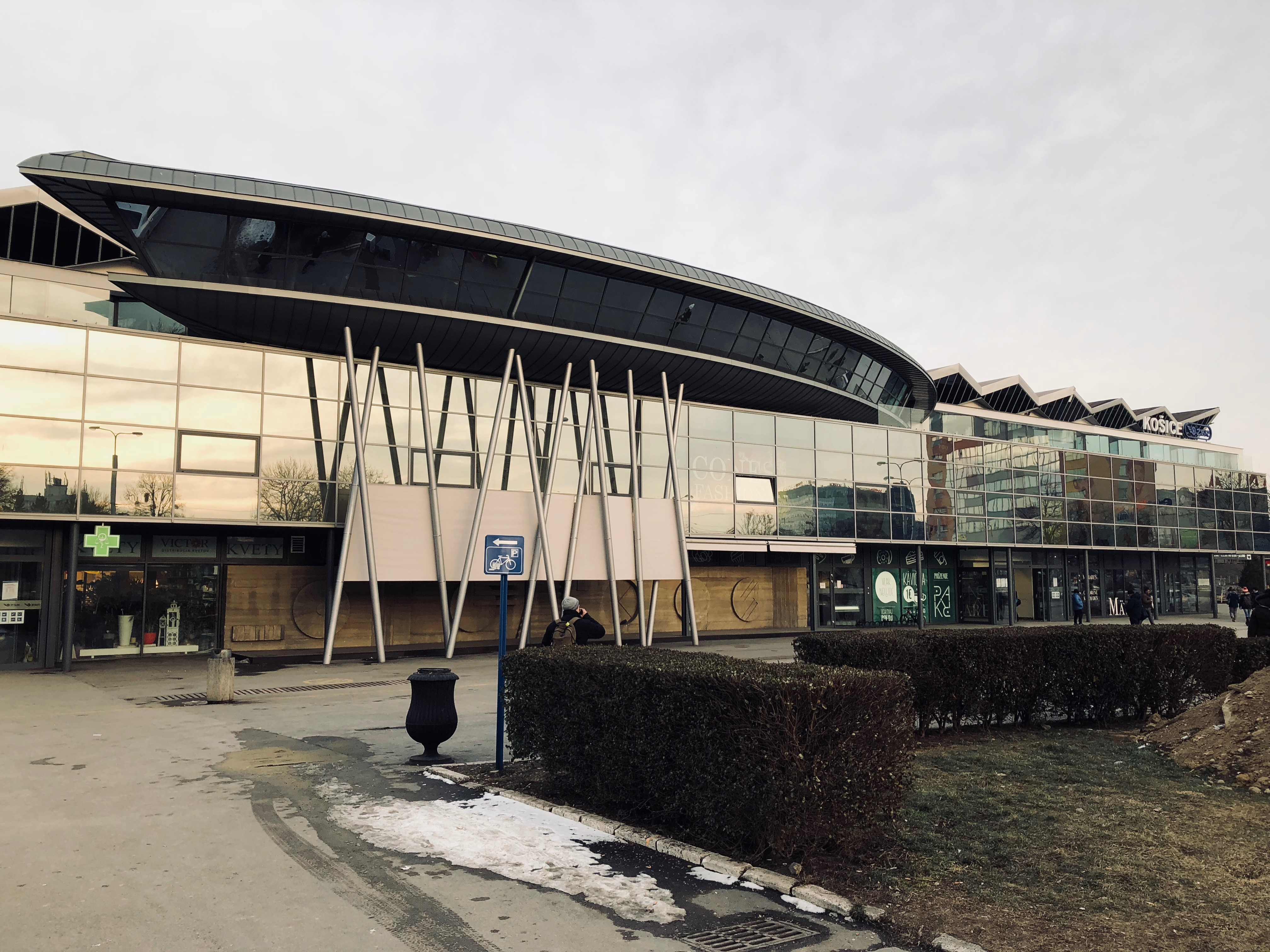 Pohľad na novú zrekonštruovanú stanicu v Košiciach.